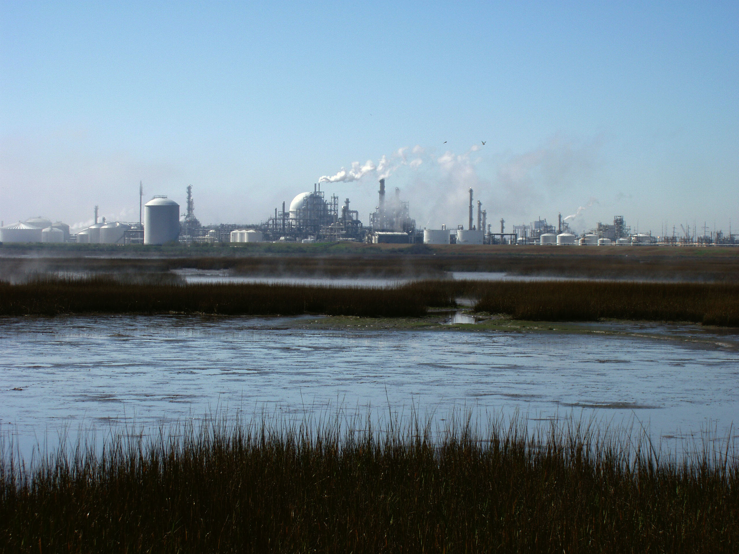 Chemieindustrie in Freeport, Texas